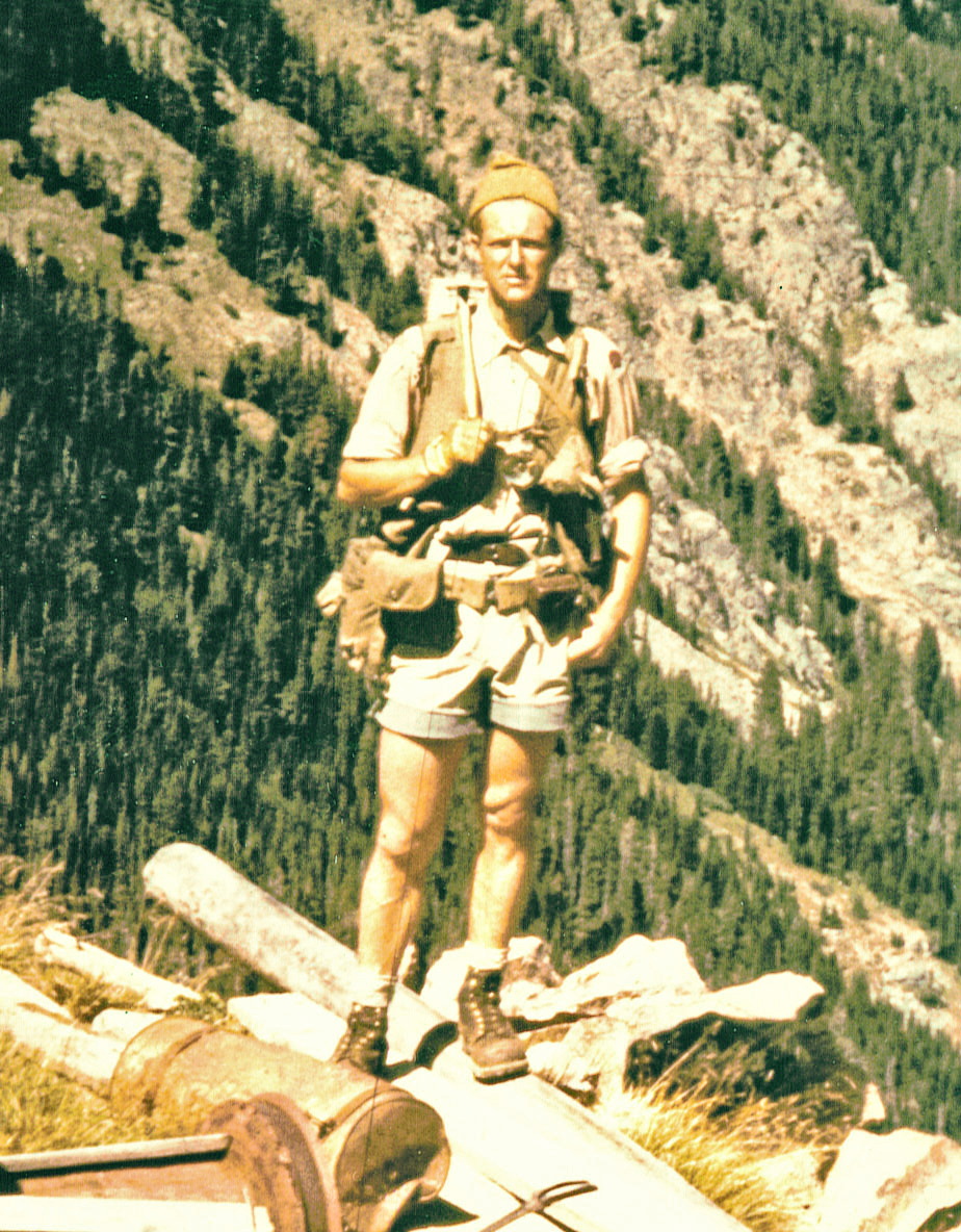 Никита Дмитриевич Лобанов-Ростовский